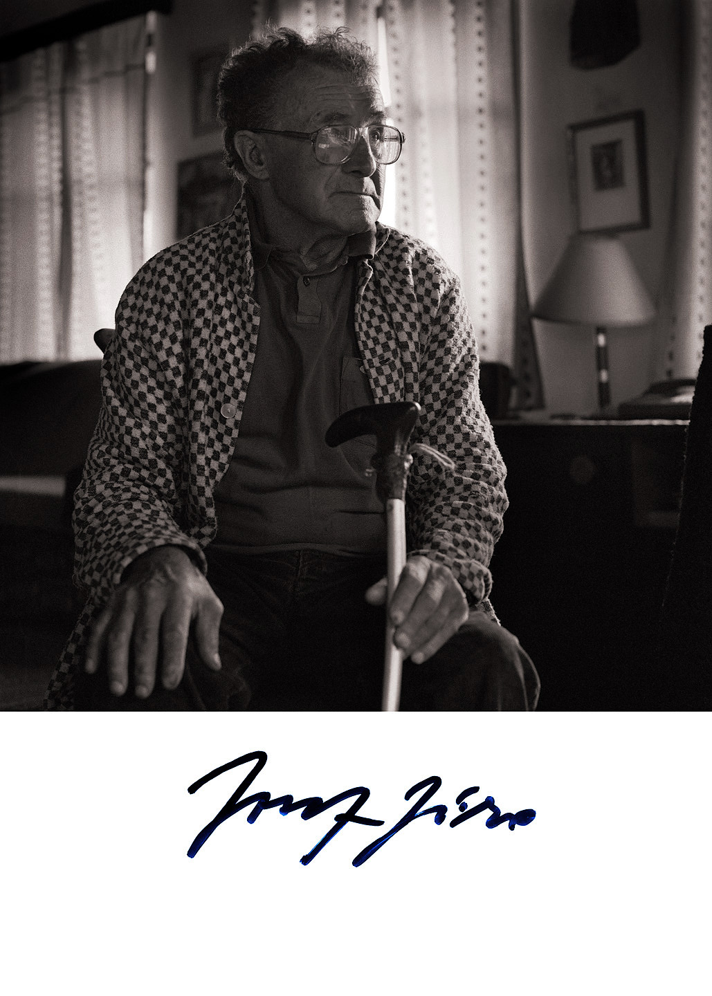 Jiří Jiroutek´s picture Cyklus: Osobnosti